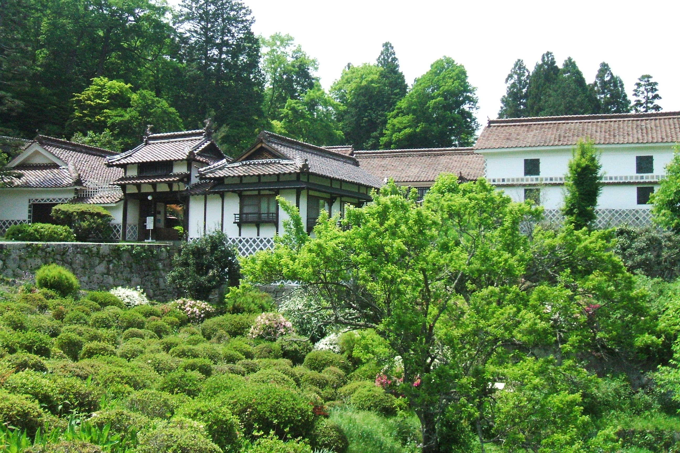 岡山県高梁市にある西江邸。日本の鉱山主の邸宅として著名である。